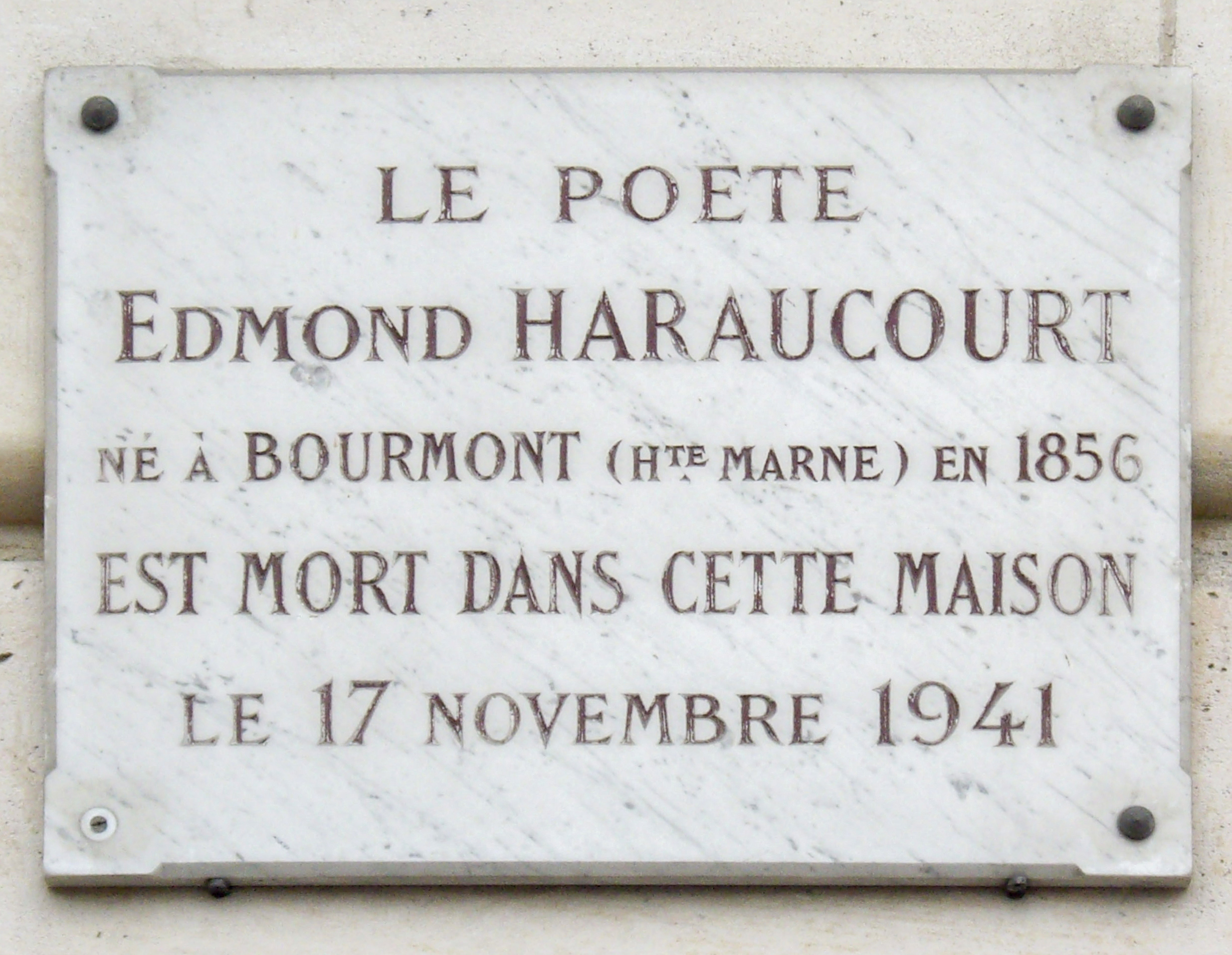 Plaque apposée au n° 5 du quai aux Fleurs, Paris 4e, où vécut le poète Edmond Haraucourt (1856-1941) et où il est mort le 17 novembre 1941.